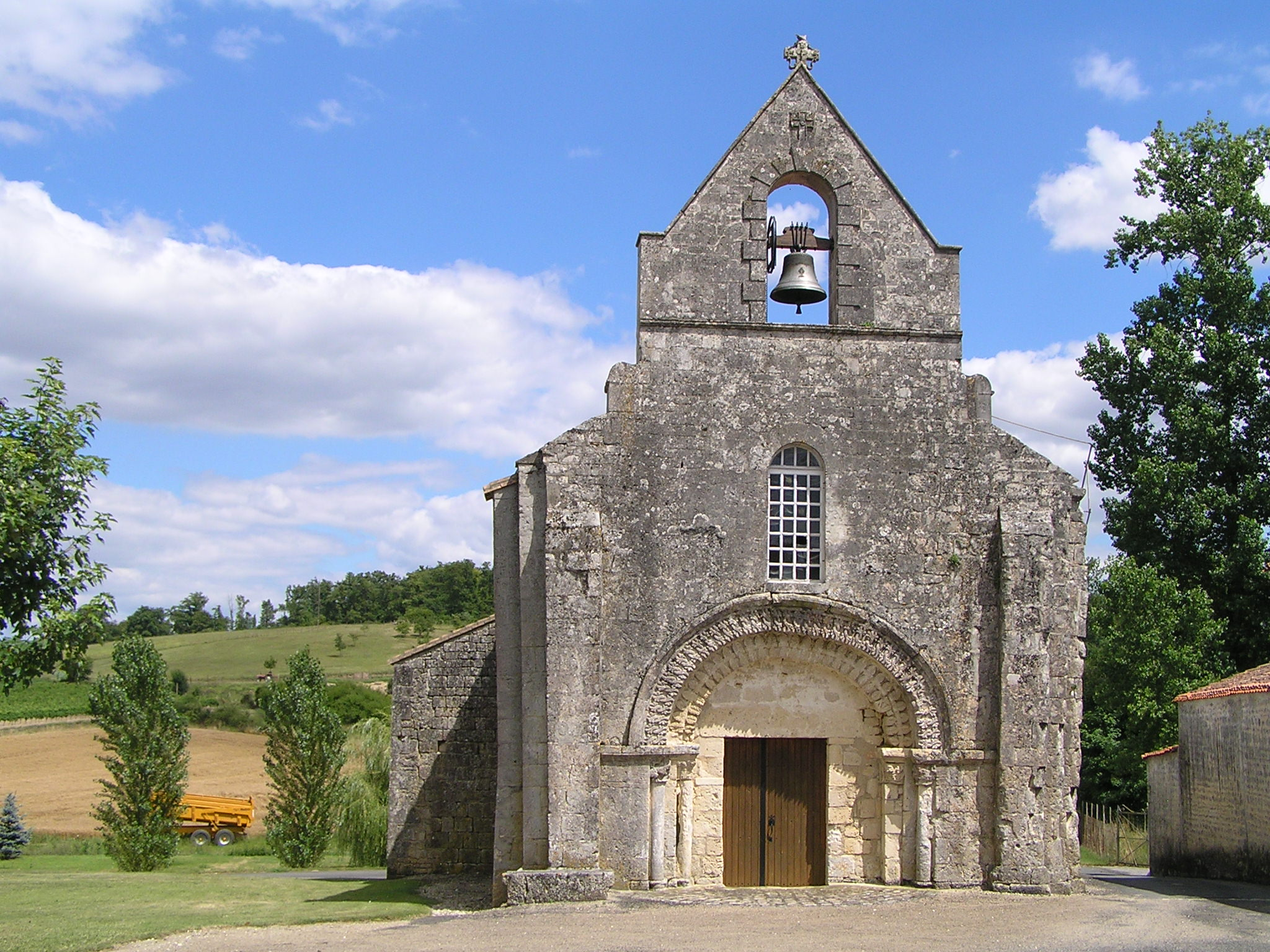 église de Montigné, Charente, France